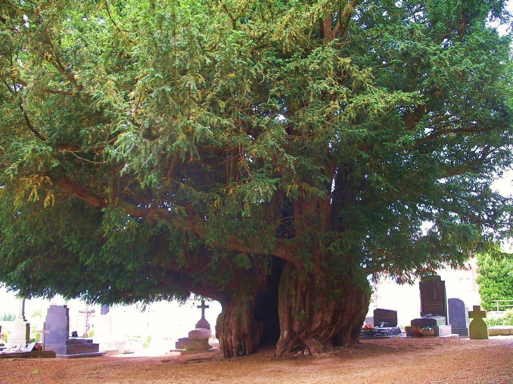 If âgé de 1600 ans dans le cimetière d' Estry (Calvados)